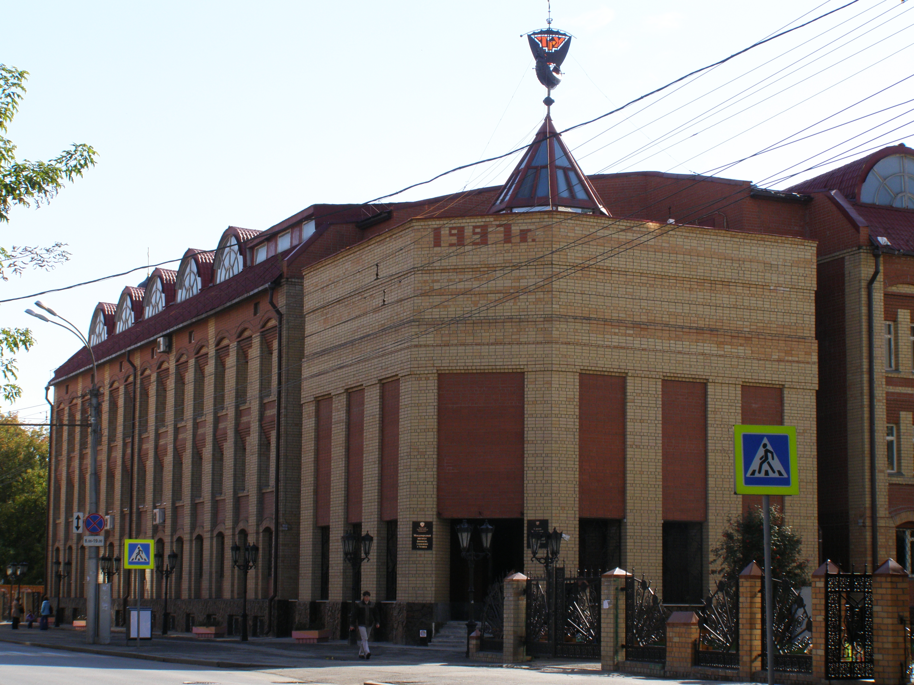 Tjumena Instituto pri Financo, Ekonomiko kaj Komerco. Tjumeno, Rusio.